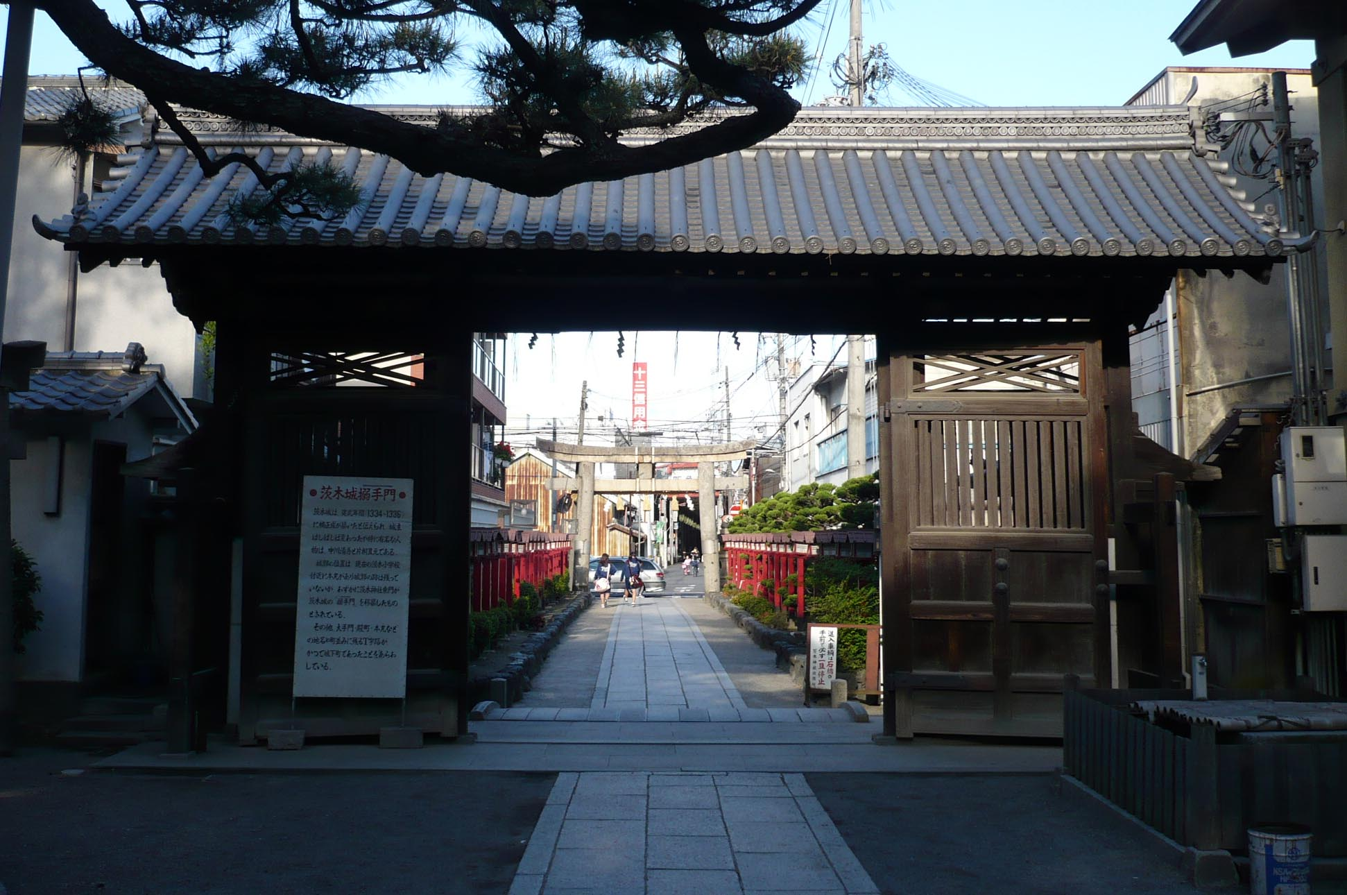 移築搦手門跡